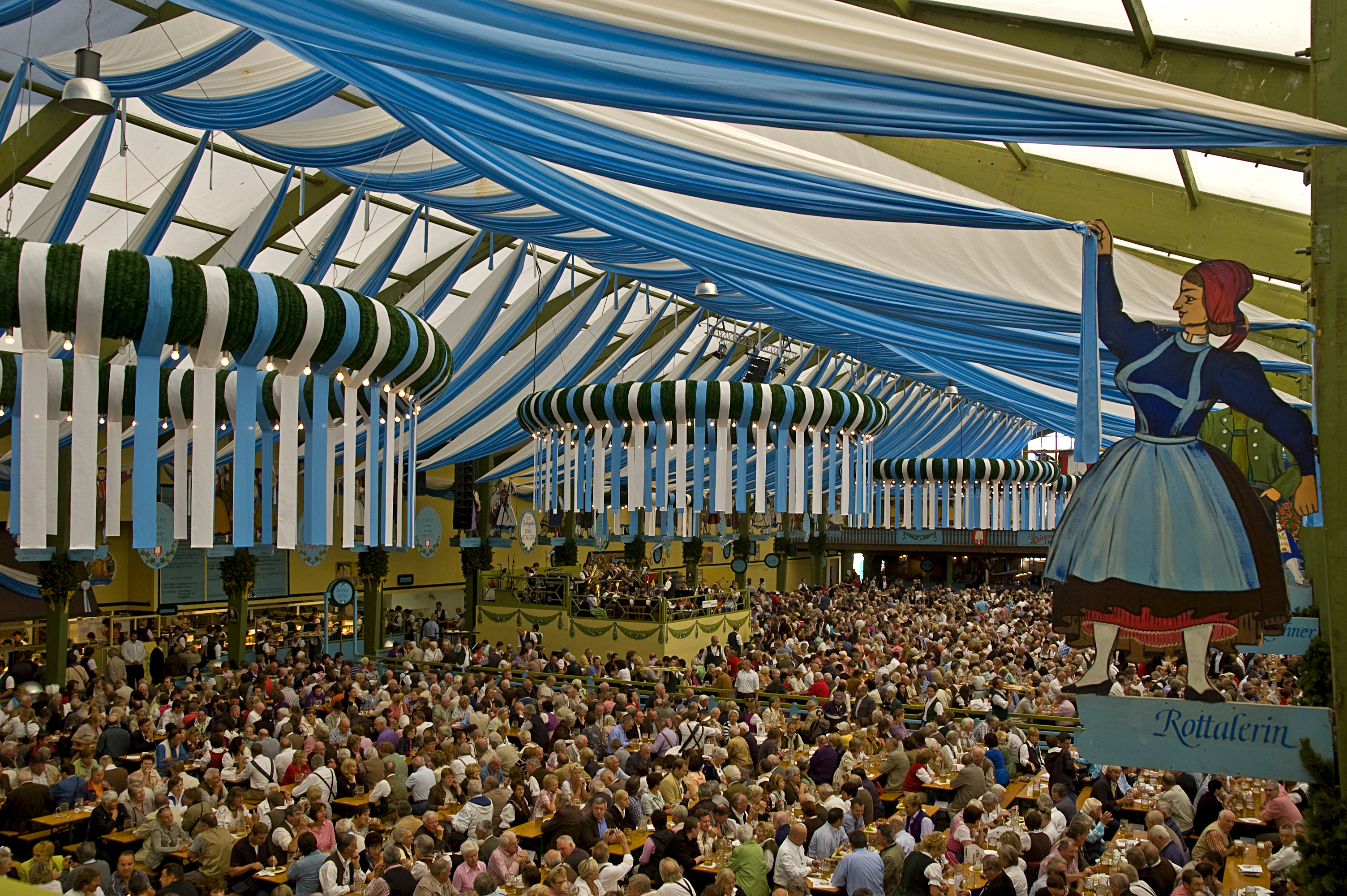 Oktoberfest 2011 ... Spatenbräu - Festzelt